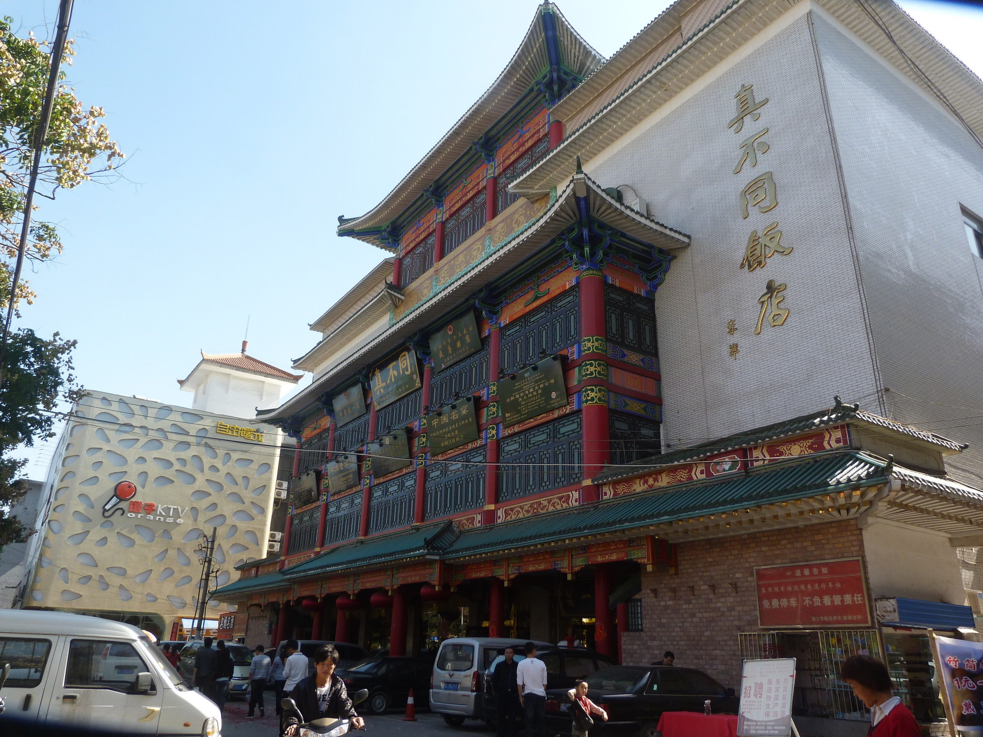 洛阳真不同饭店